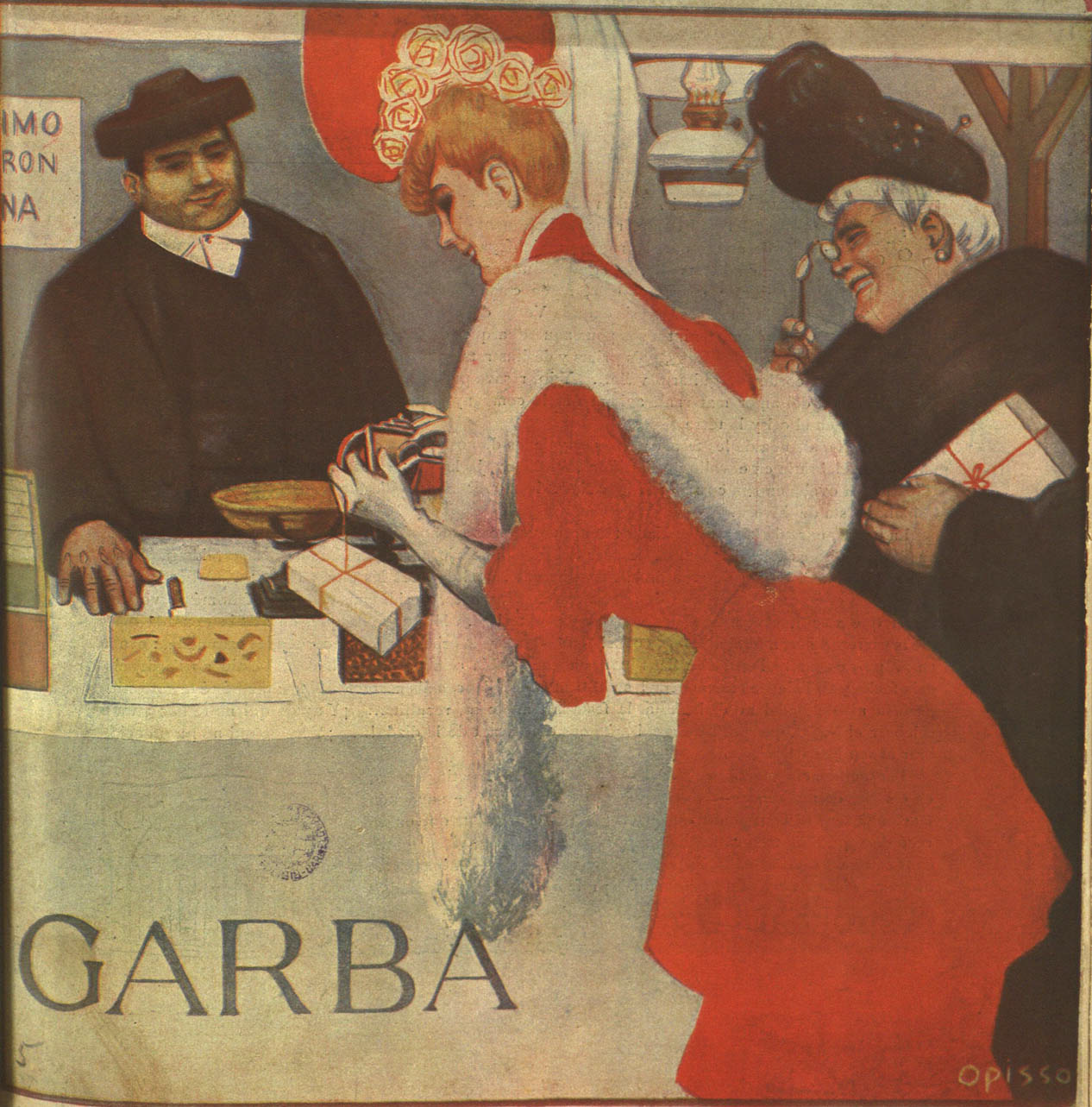 Garba (revista)